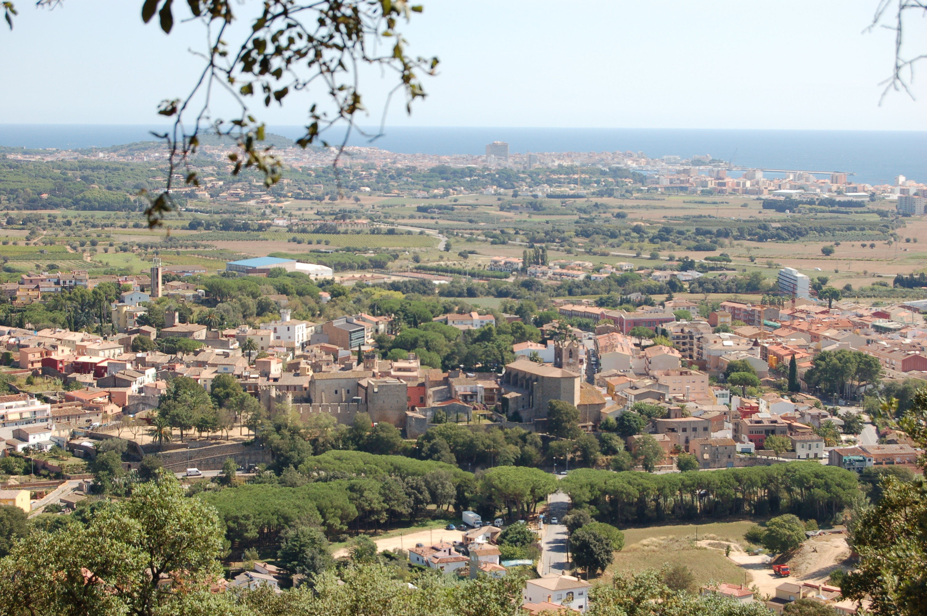 Foto de Calonge (municipi de la Costa Brava).